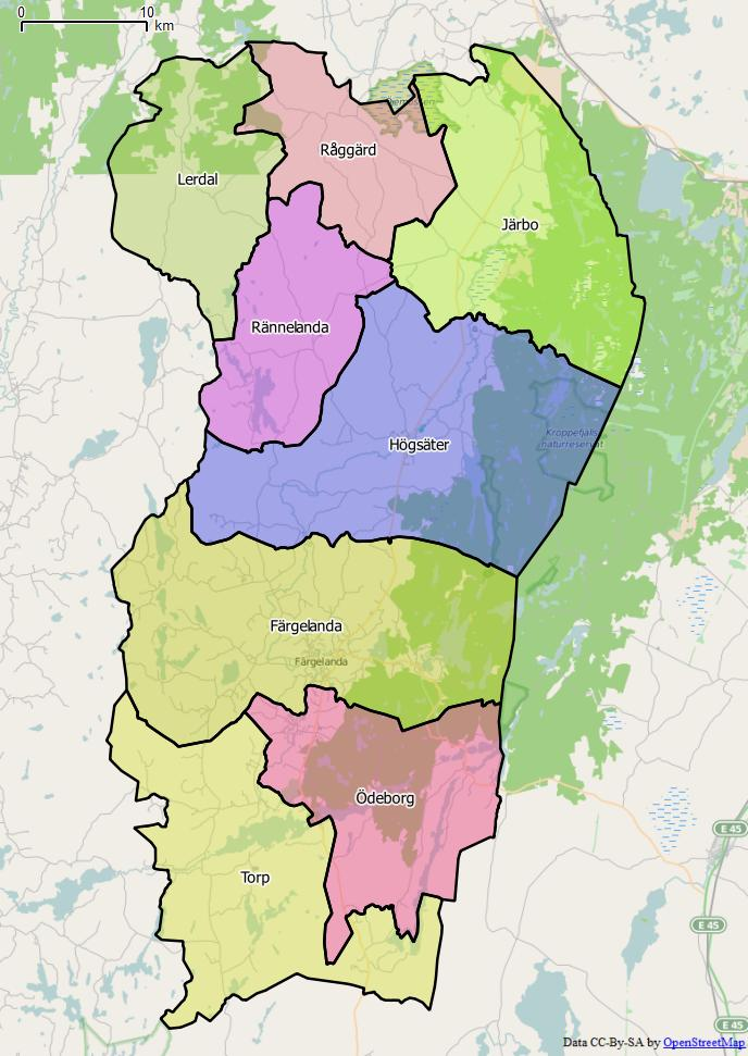 Distriktsindelningen i Färgelanda kommun